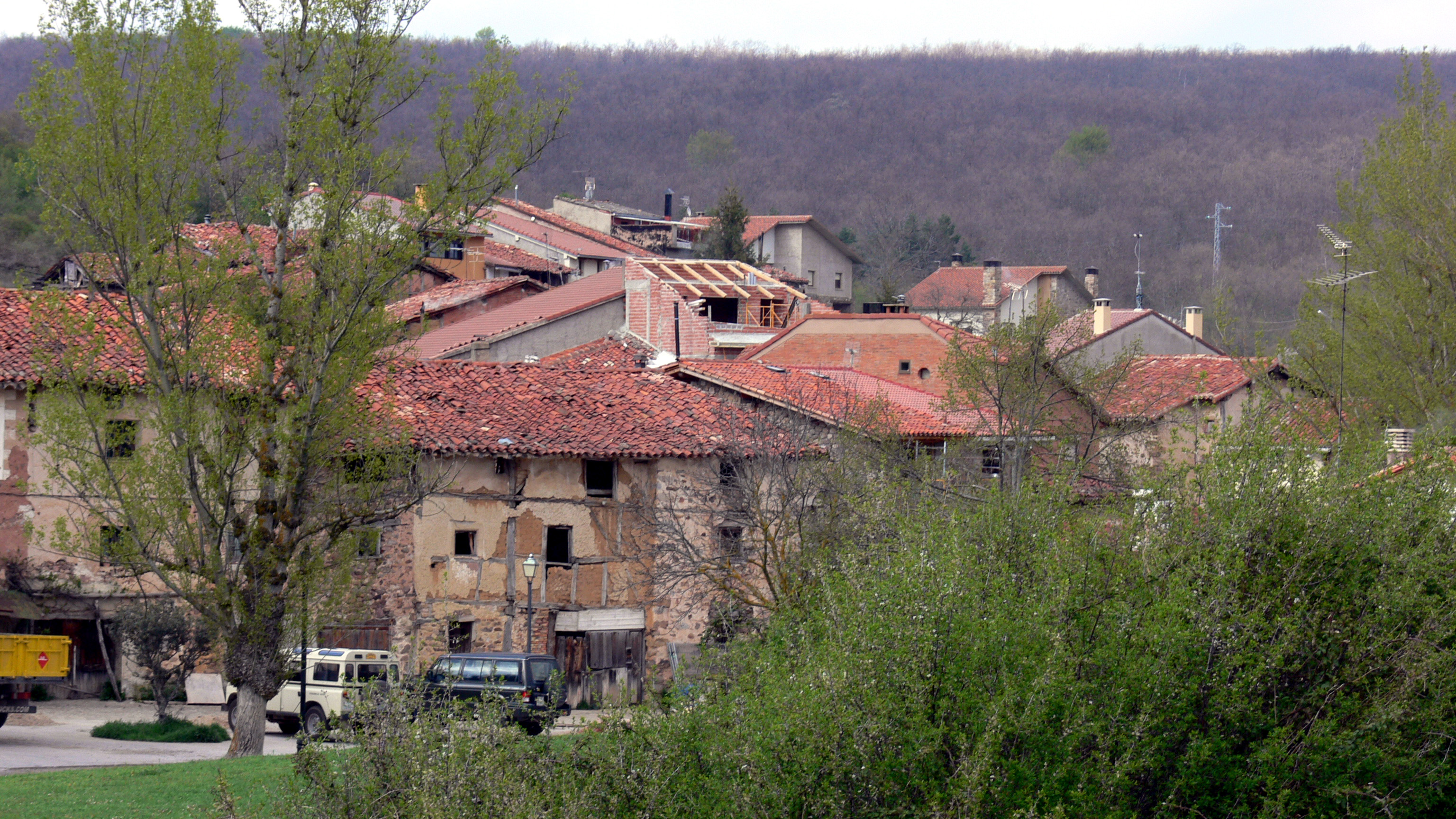 Montemediano, aldea de Nieva de Cameros (La Rioja - España)